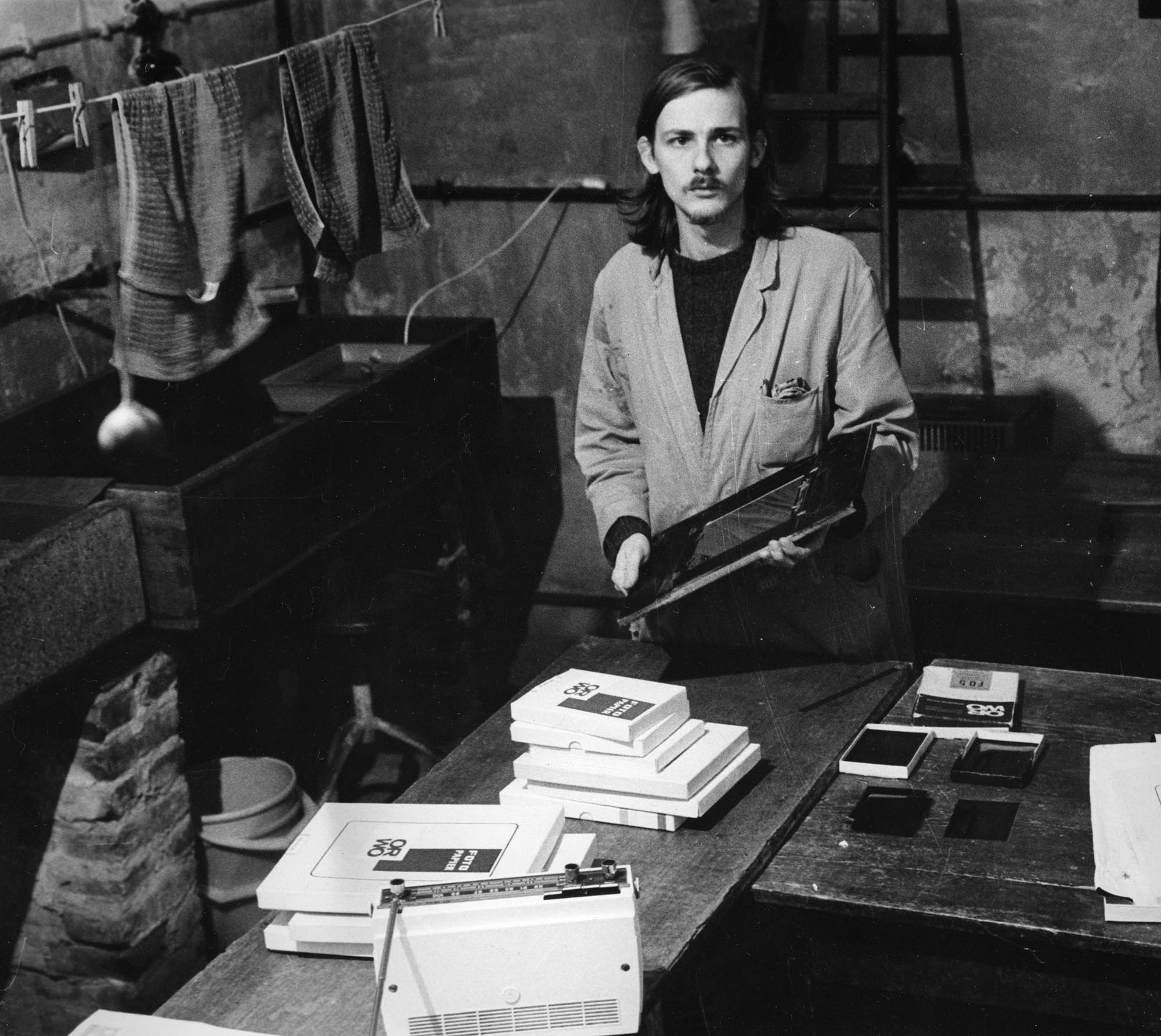 im der Dunkelkammer der Firma: Fototechnik Schwede , Reinhld-Huhn-Straße Berlin-Mitte